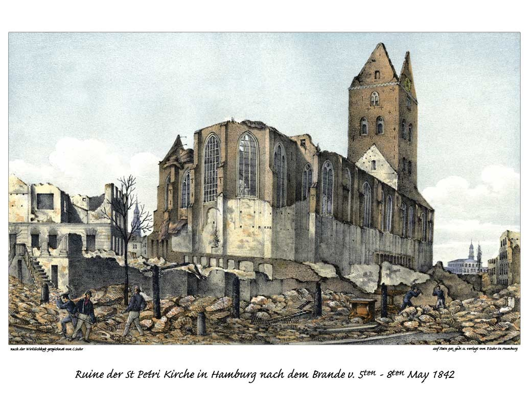 Ruine der St. Petri Kirche in Hamburg nach dem Brande..., gezeichnet von Christoffer Suhr, Litho von Peter Suhr